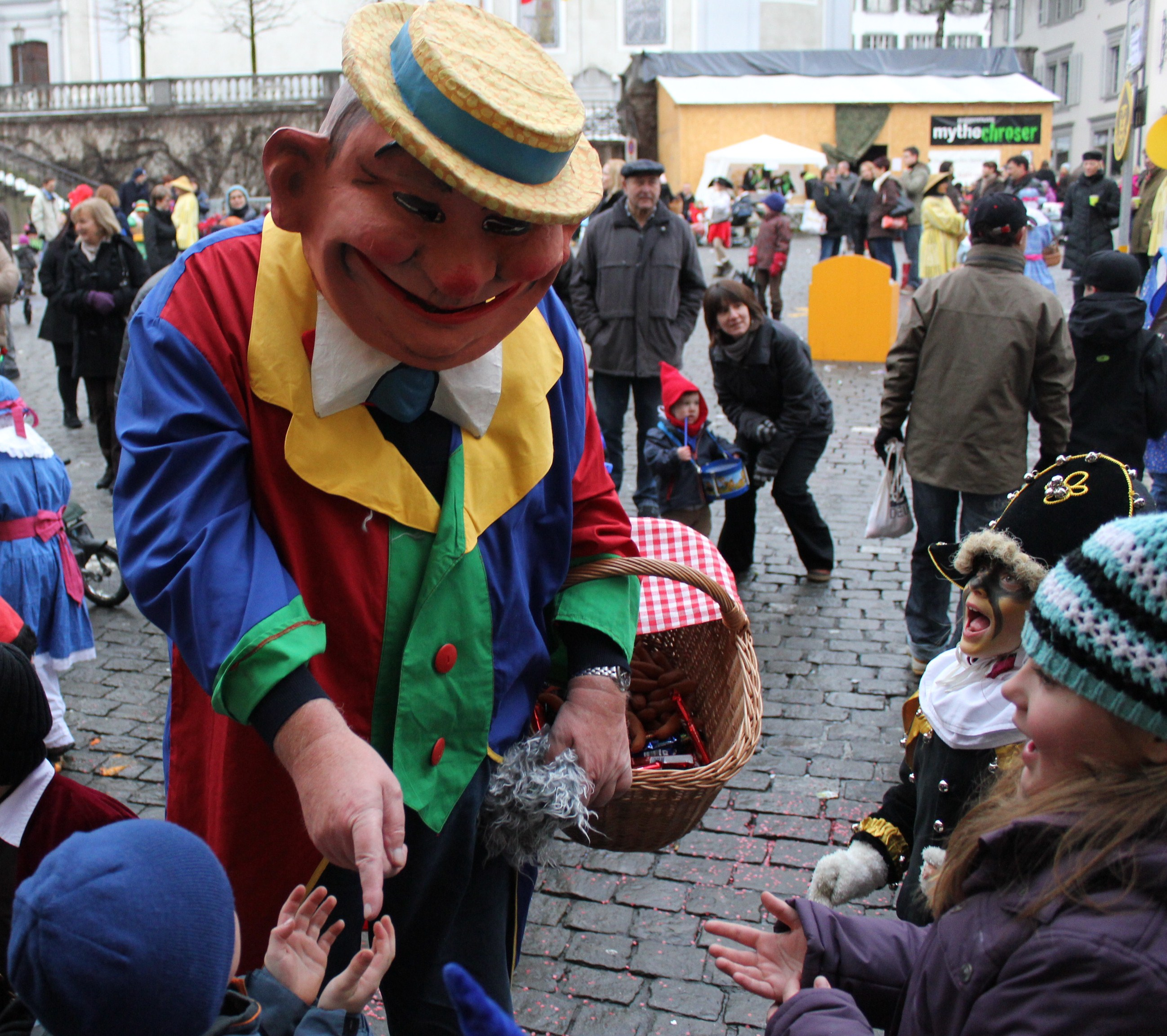 Ein Maschgerad mit Grossgrind bei der Kinderbescherung am Schmutzigen Donnerstag. Die Kinder erheischen mit lautem Kreischen ("Güüsse") Orangen und Süssigkeiten von den Narren.